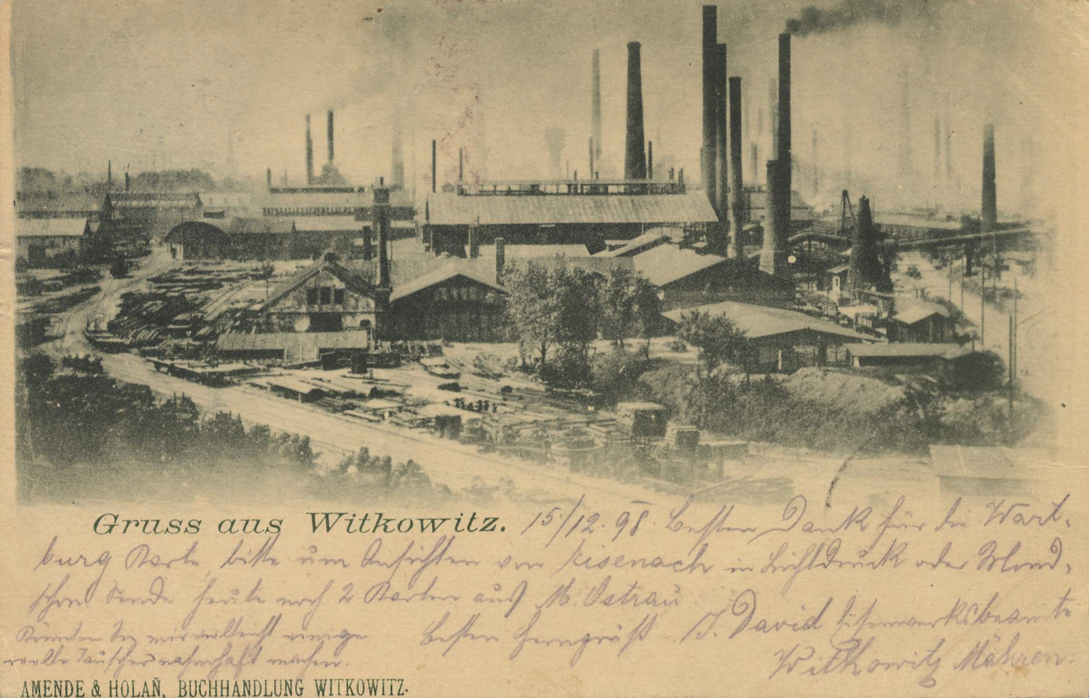 Witkowitz in Mähren, Industrieanlagen (Witkowitzer Bergbau- und Hüttengewerkschaft) und Bahnhof am Stadtrand